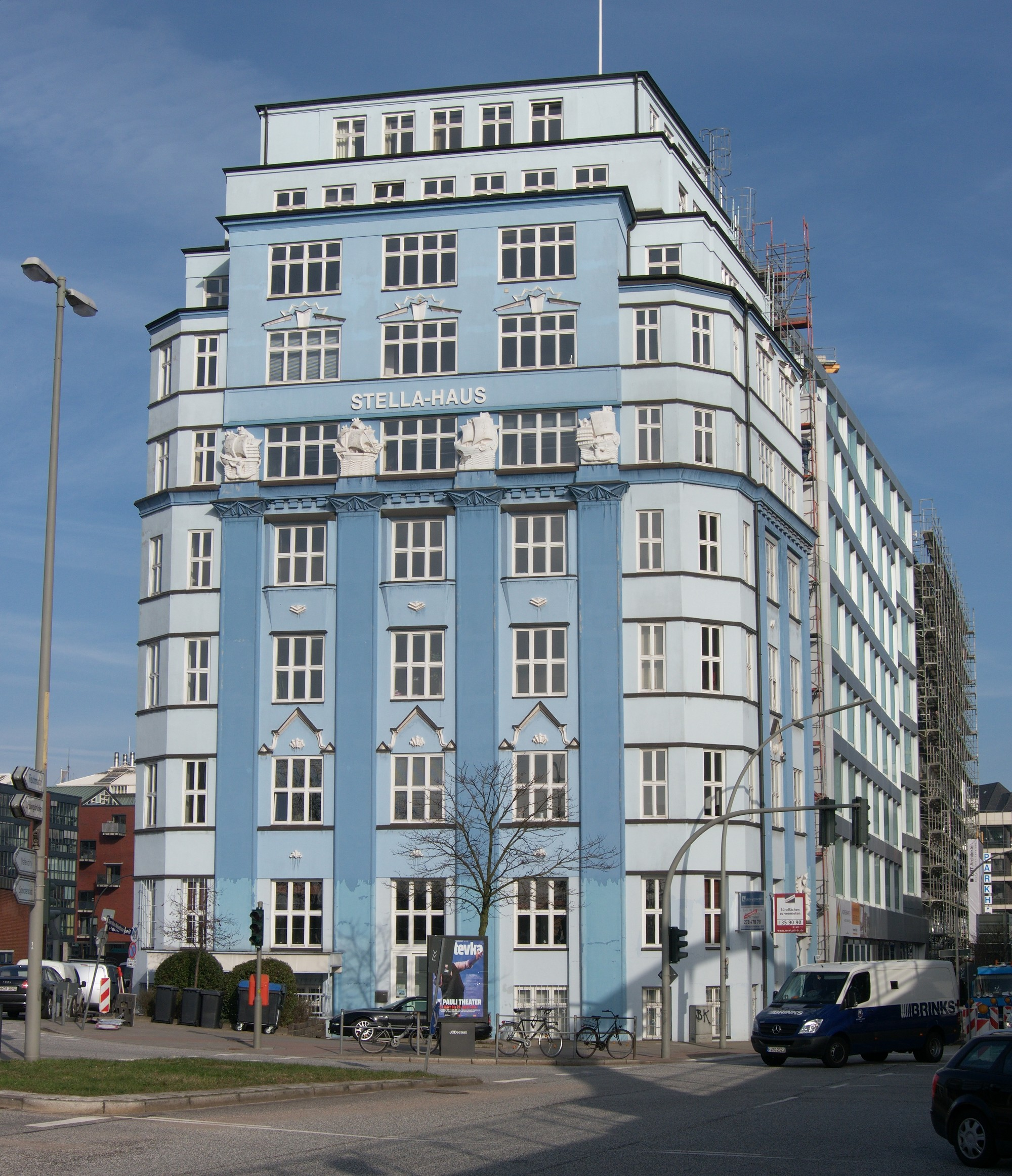 Stellahaus am Rödingsmarkt, Architekt:Martin Haller (1874/75); Aufstockungen 1921 Lindhorst, Reith, Zauleck & Hormann